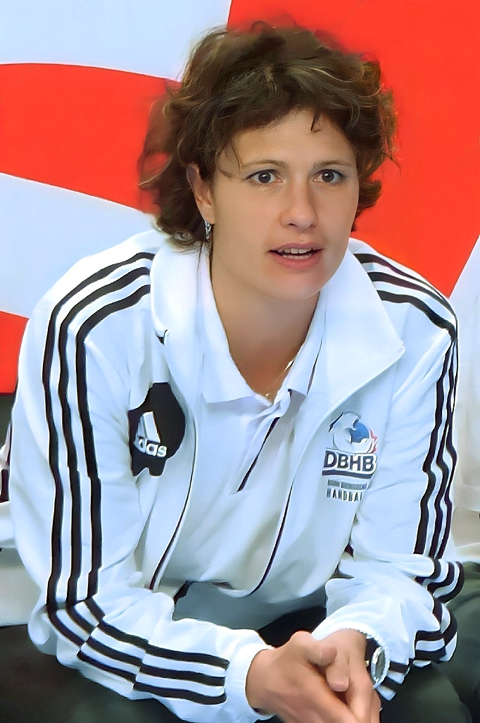 Elena Groposila, entraïneur dans le club masculin du Cercle Dijon Bourgogne Handball, lors du match face au PSG Handball. Le 23 avril 2014.